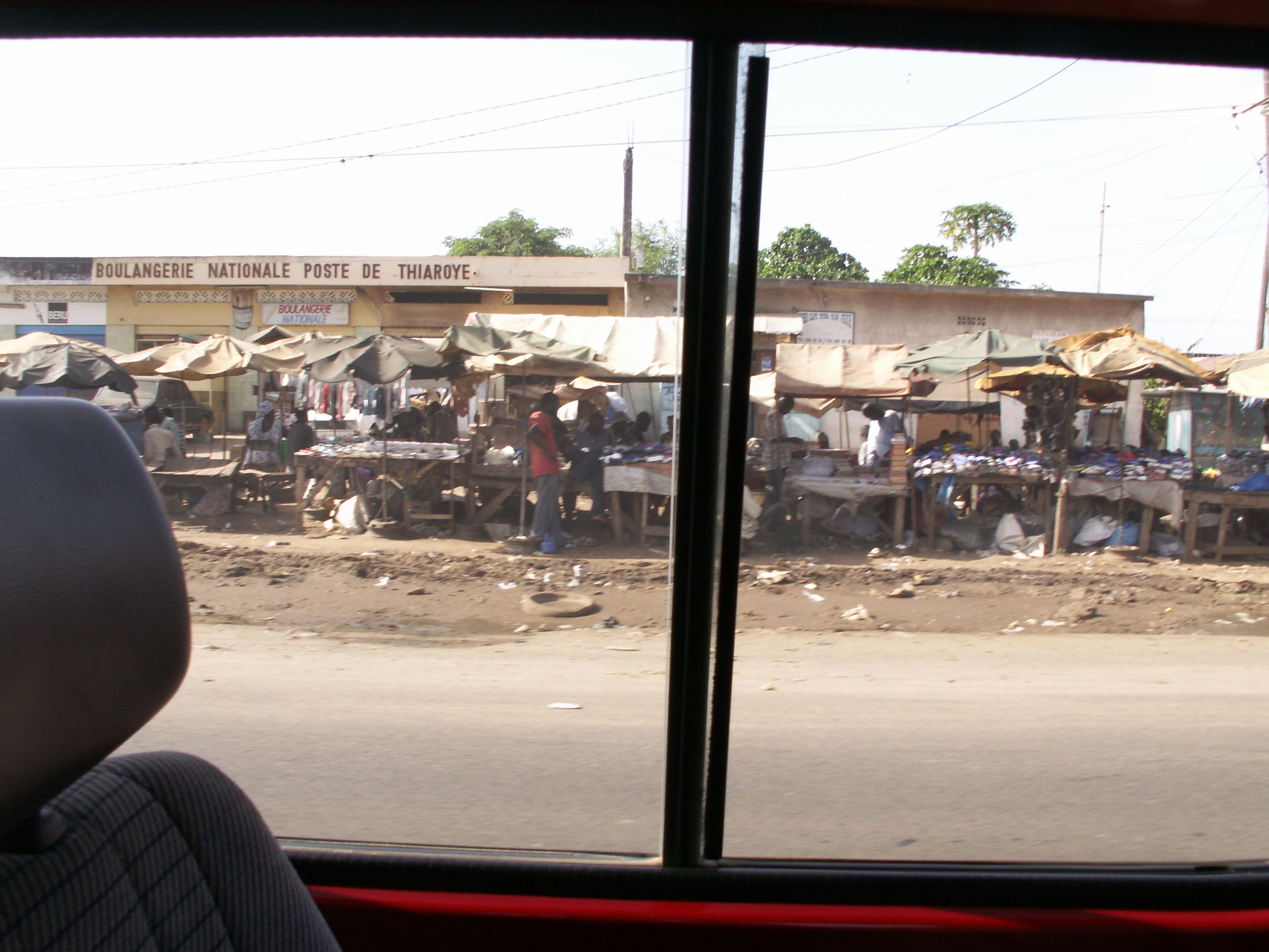 Etas de marchands sur le bord de la route à Thiaroye près de Dakar (Sénégal)